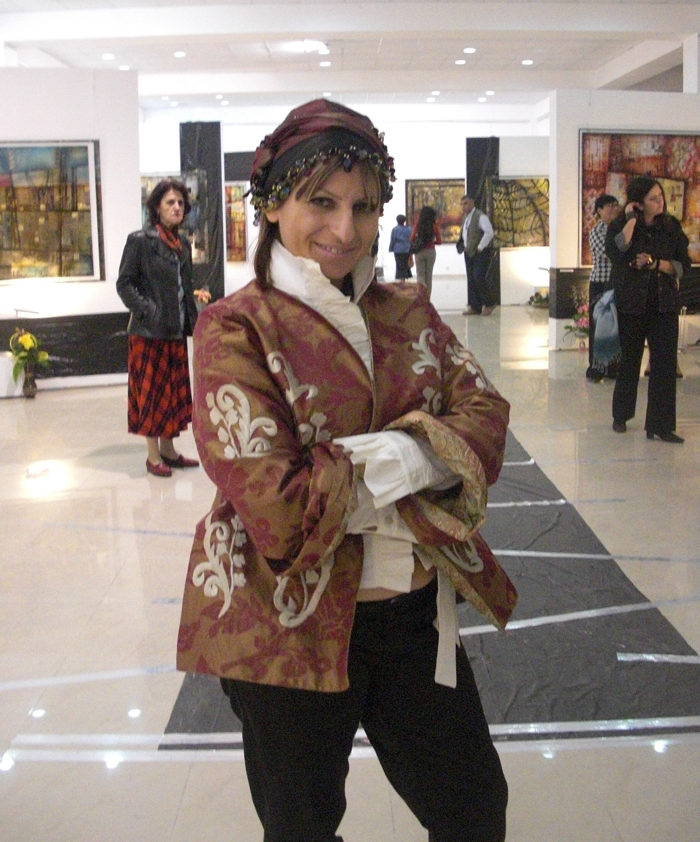 Նկարչուհի-ձևավորող Արև Պետրոսյան